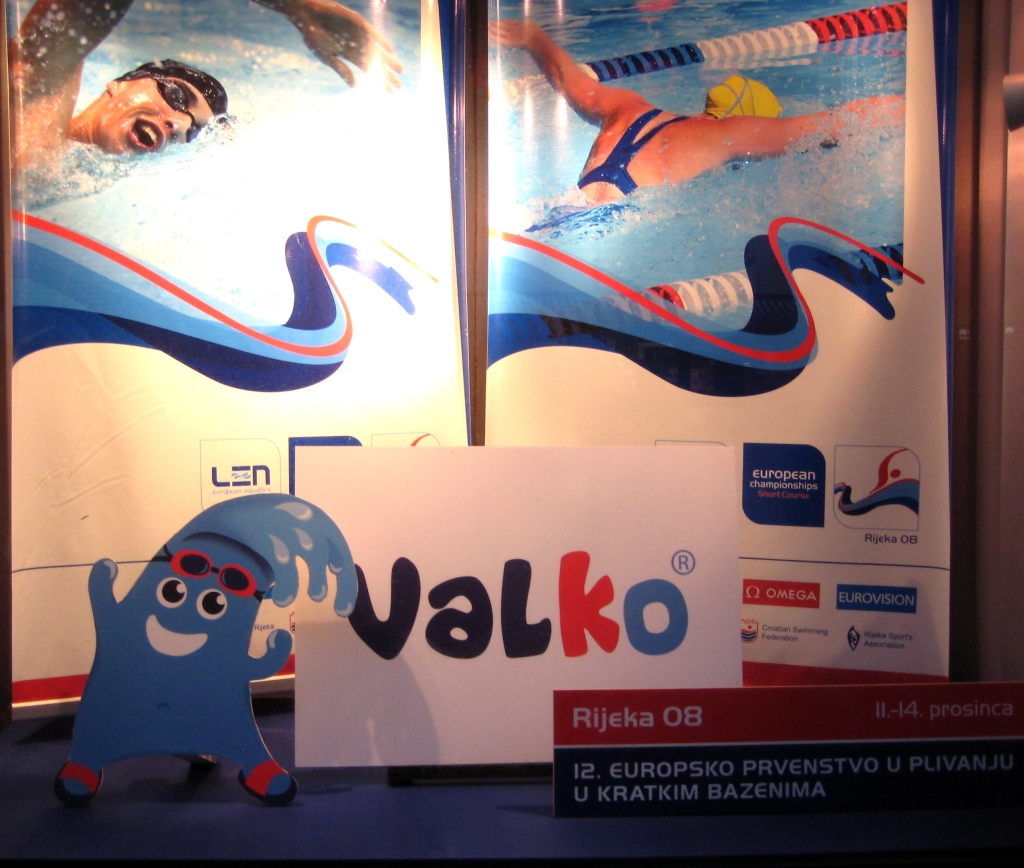 Valko, maskota Europskog prvenstva u malim bazenima u Rijeci.